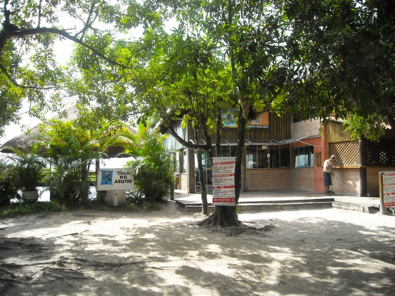 Por dentro de uma das trilhas da Ilha do Mel, Paraná, Brasil